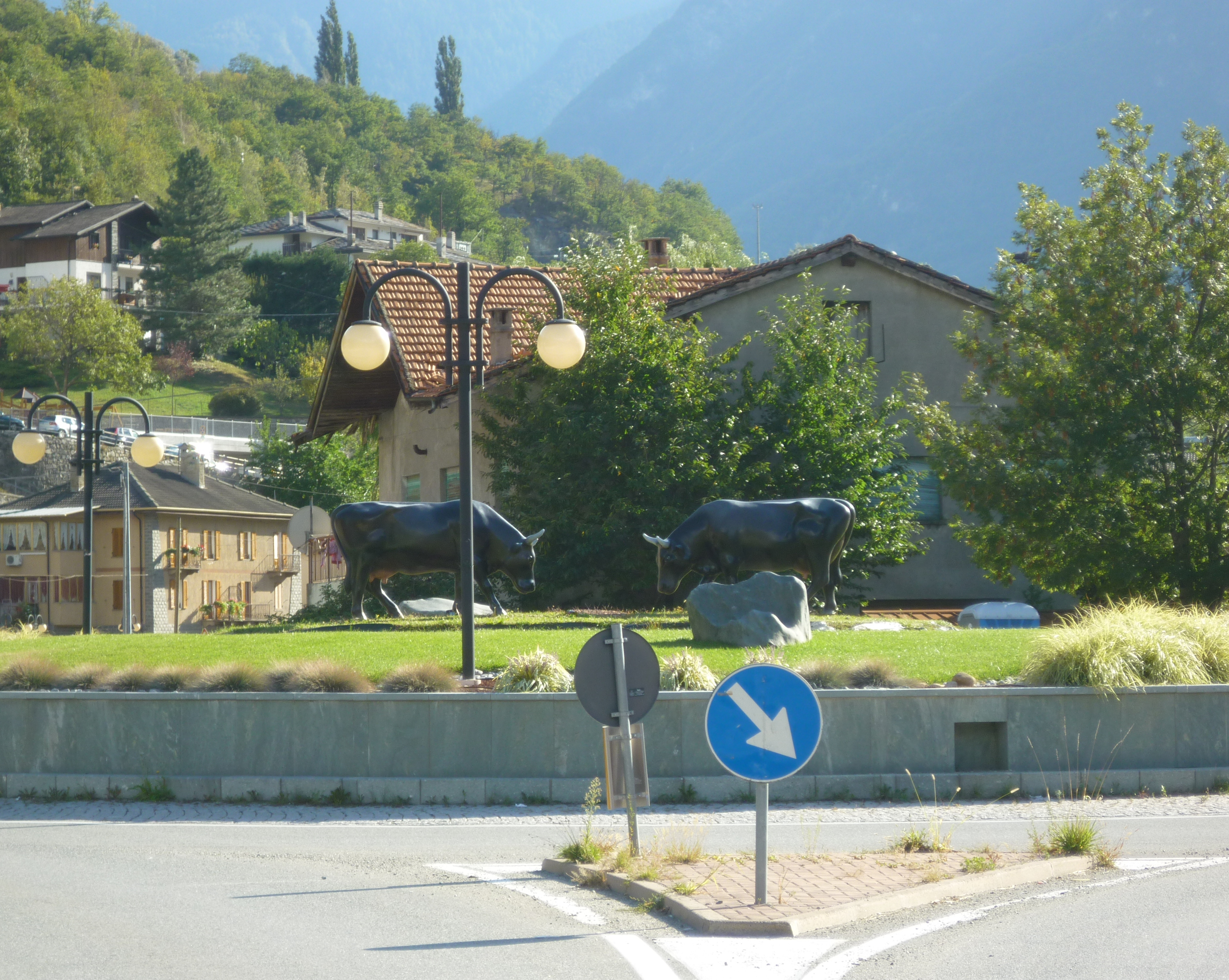 Rond point avec sculptures dédiées à la bataille de reines à Montjovet (Vallée d'Aoste - Italie)